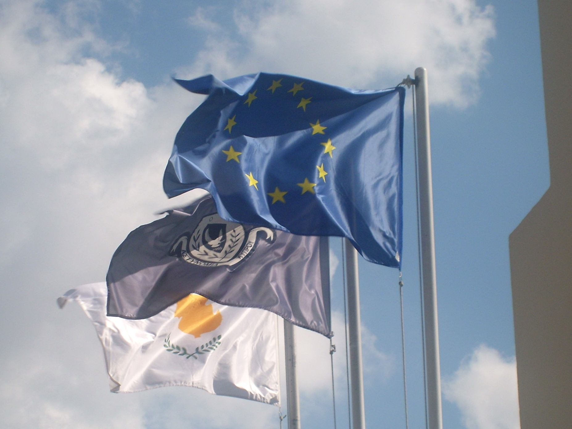 Amtliche Beflaggung an einem Polizeirevier auf Zypern. Die blaue Fahne ist die Amtsfahne der Polizei